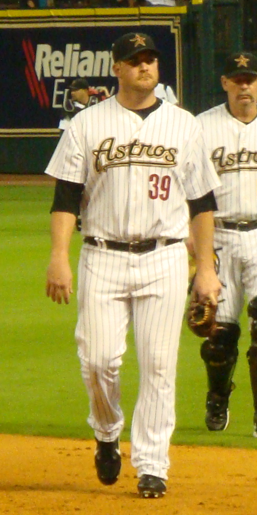 Jeff Fulchino